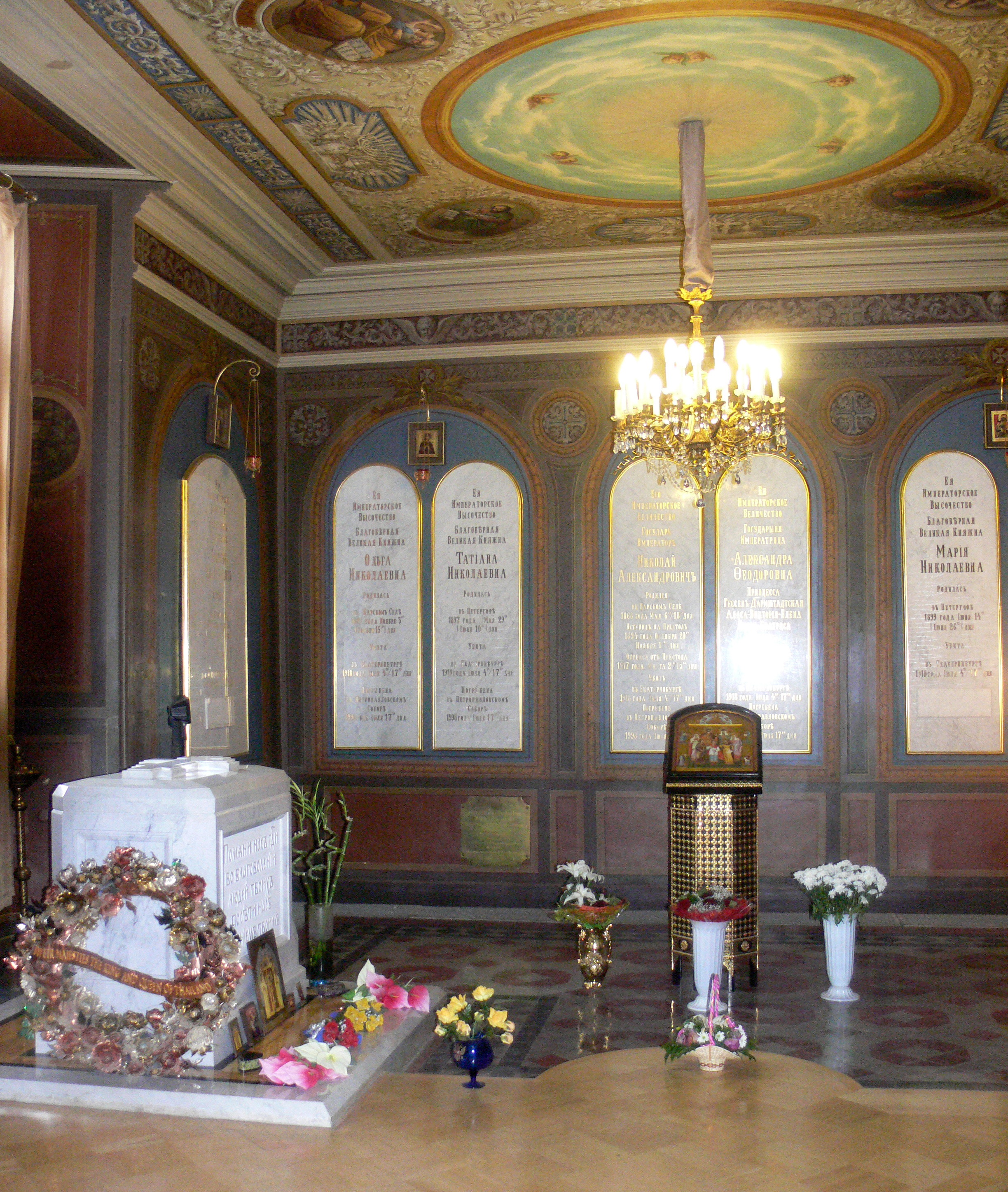 Grabkapelle der Romanows linke Seite